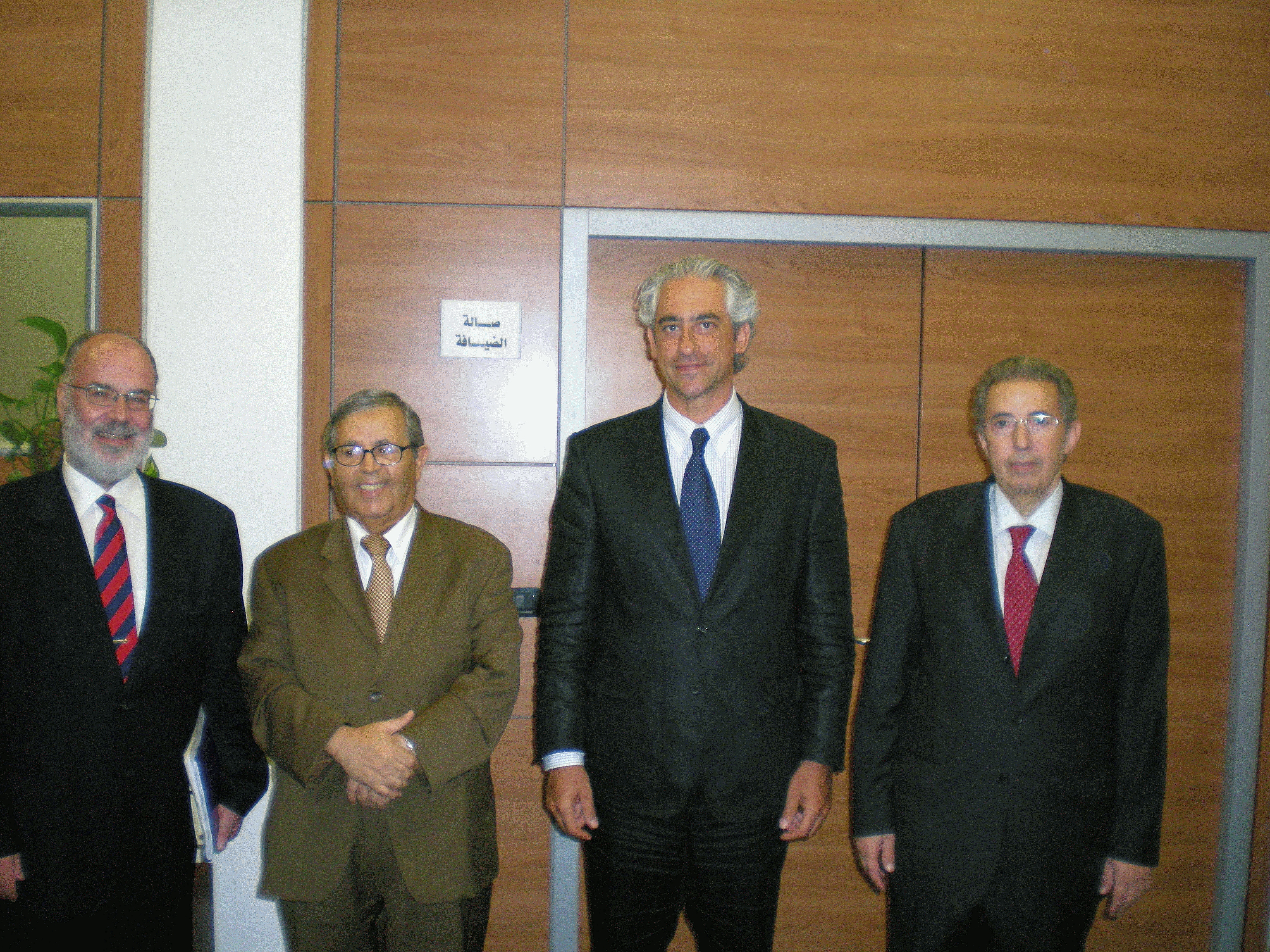 Συνάντηση με Υπουργό Σχεδιασμού και Οικονομικών κ Zletni και με Πρόεδρο Λιβυκής Αρχής Επενδύσεων κ Mohamed Layas Φωτογραφία: Υπουργείο Εξωτερικών. Αποτελέσματα επίσημης επίσκεψης ΥΦΥΠΕΞ κ. Σπύρου Κουβέλη στη Λιβύη (19-21.07.2010)